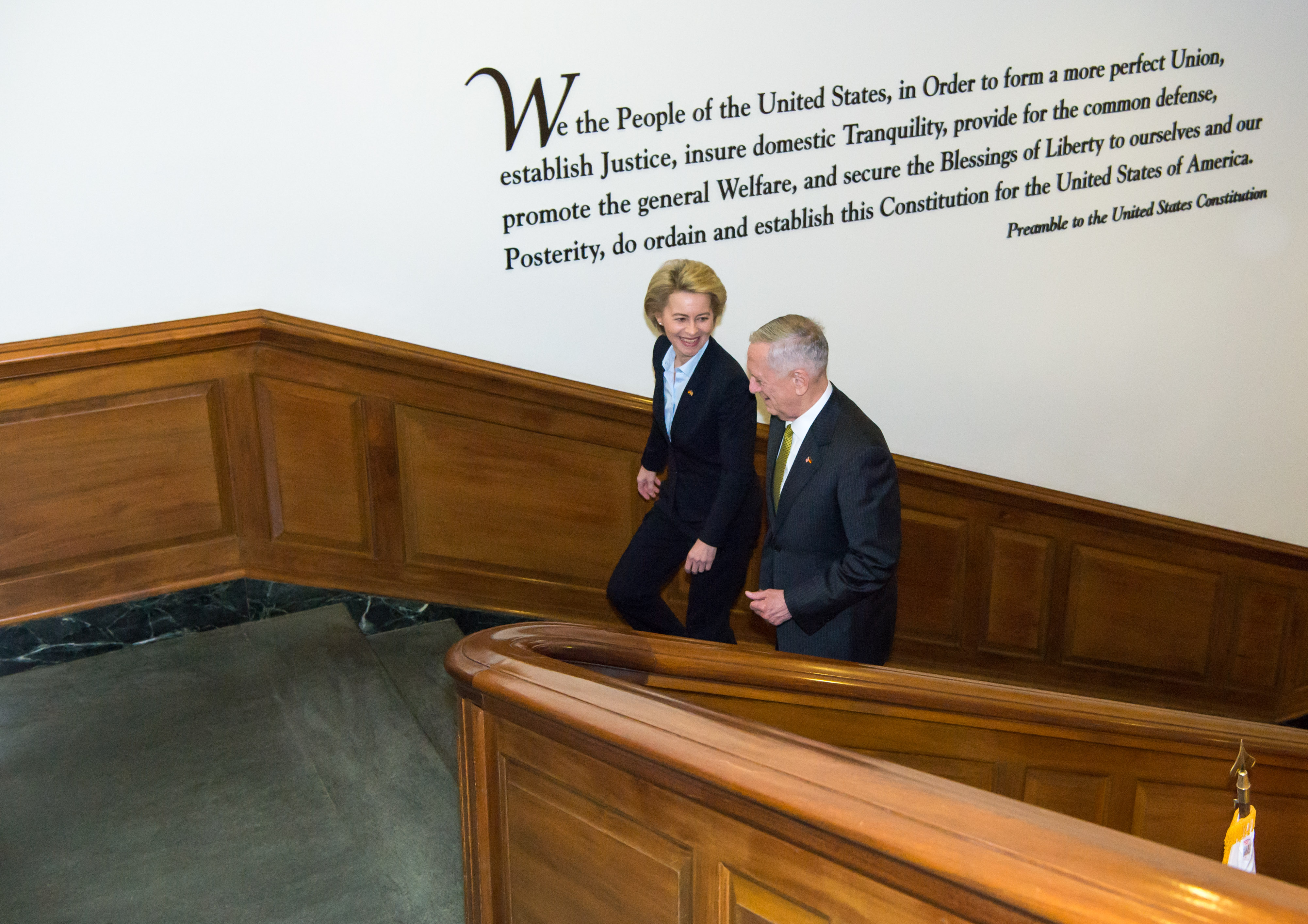 Treffen des US-Verteidigungsministers James N. Mattis mit der deutschen Bundesverteidigungsministerin Ursula von der Leyen im Pentagon in Washington, D.C.